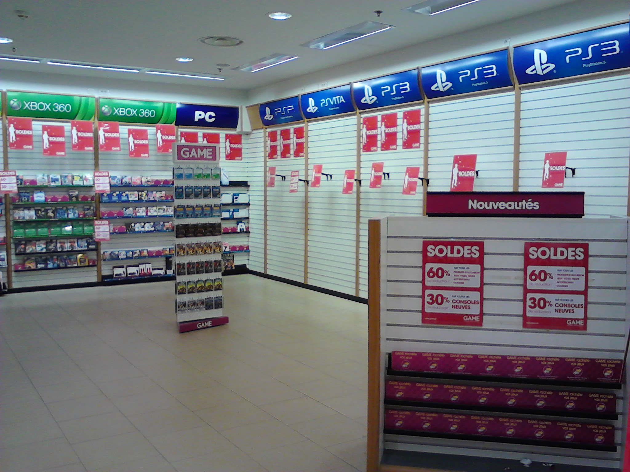 Un magasin Game vide à Strasbourg